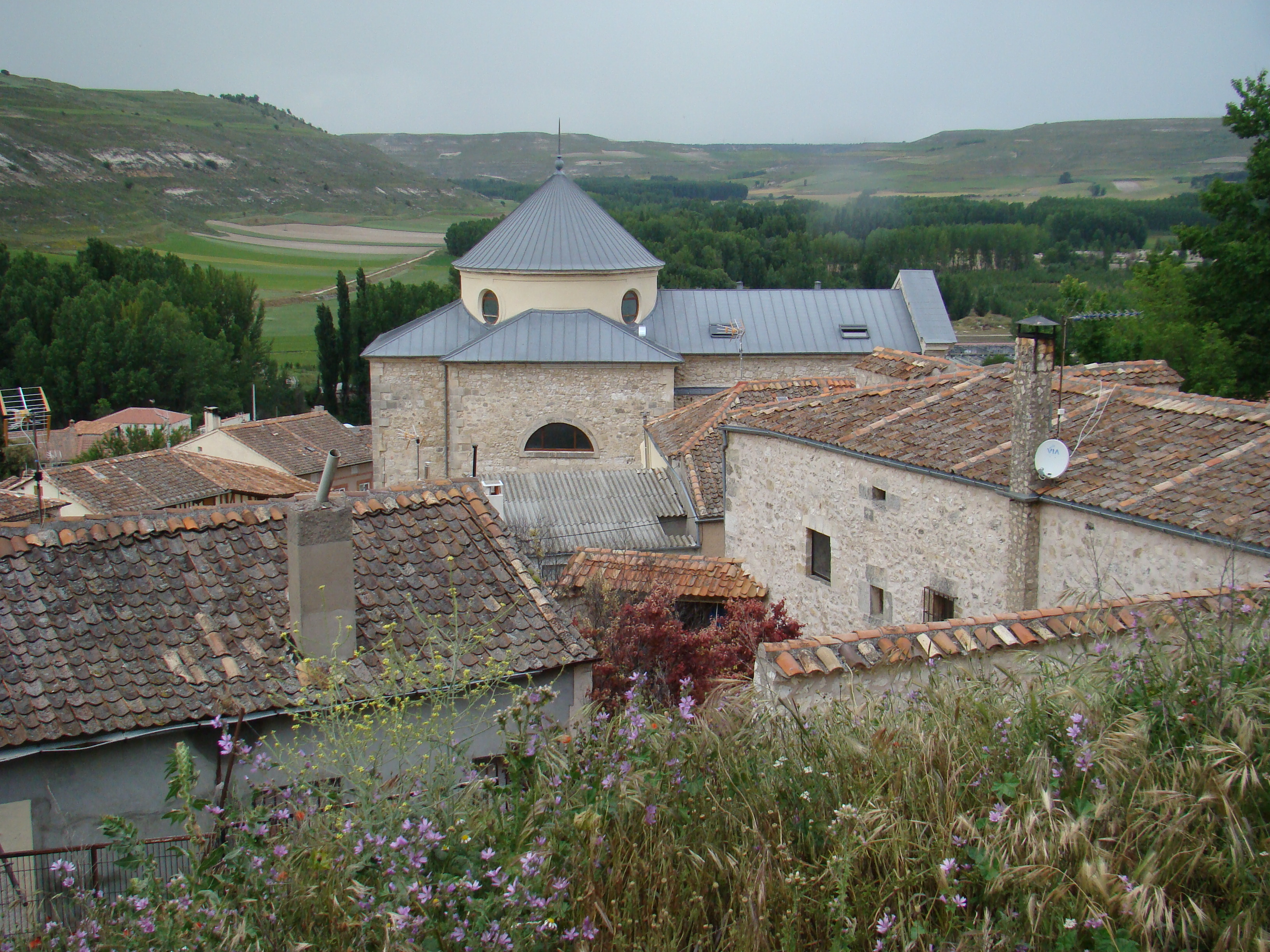 Capilla del Pilar o de los Condes de Montijo de estilo neoclásico, situada junto al palacio; declarada Bien de Interés Cultural, Art. 32-34 LPCCYL; la mandó construir el Conde de Montijo. Se terminó en 1720.